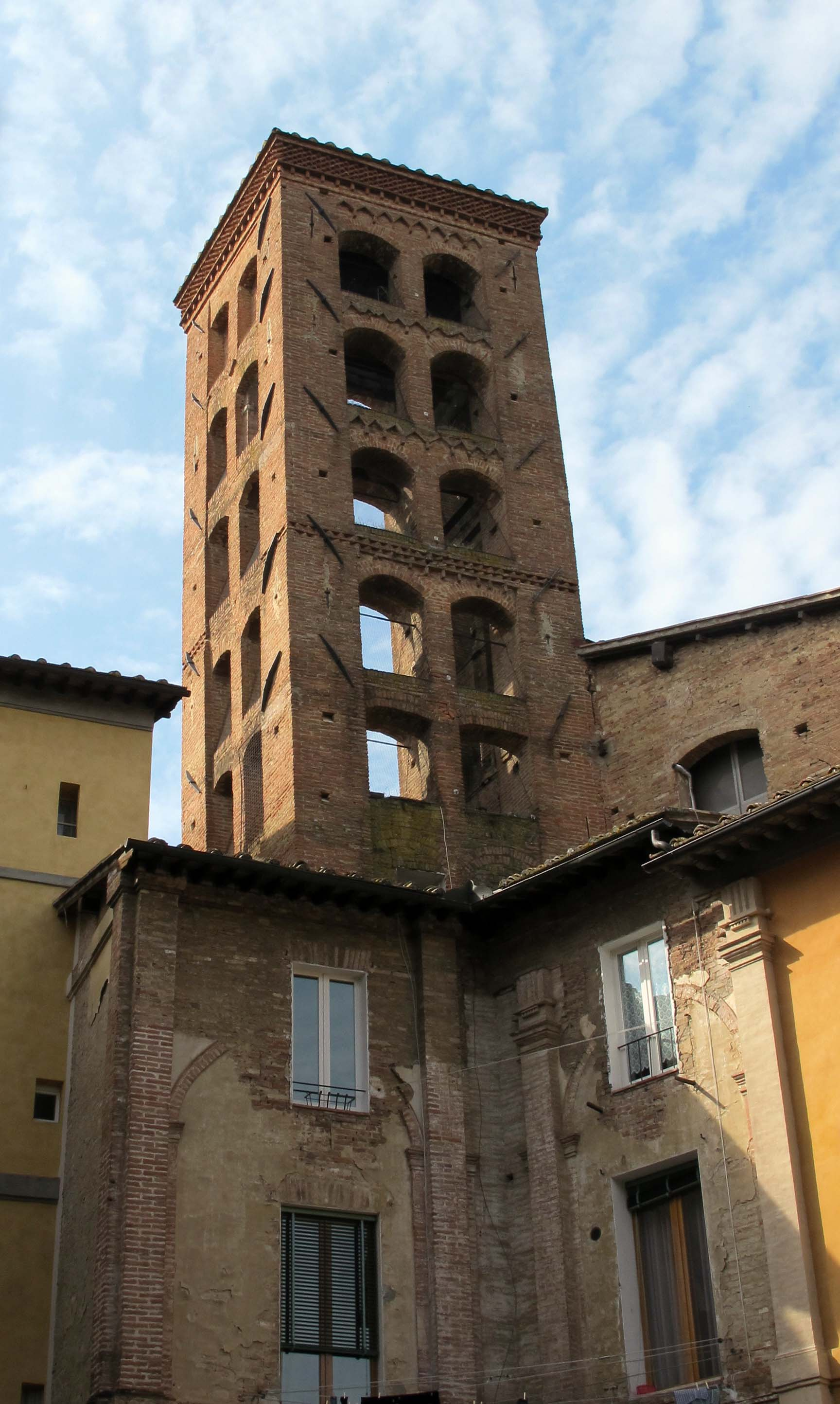 Siena